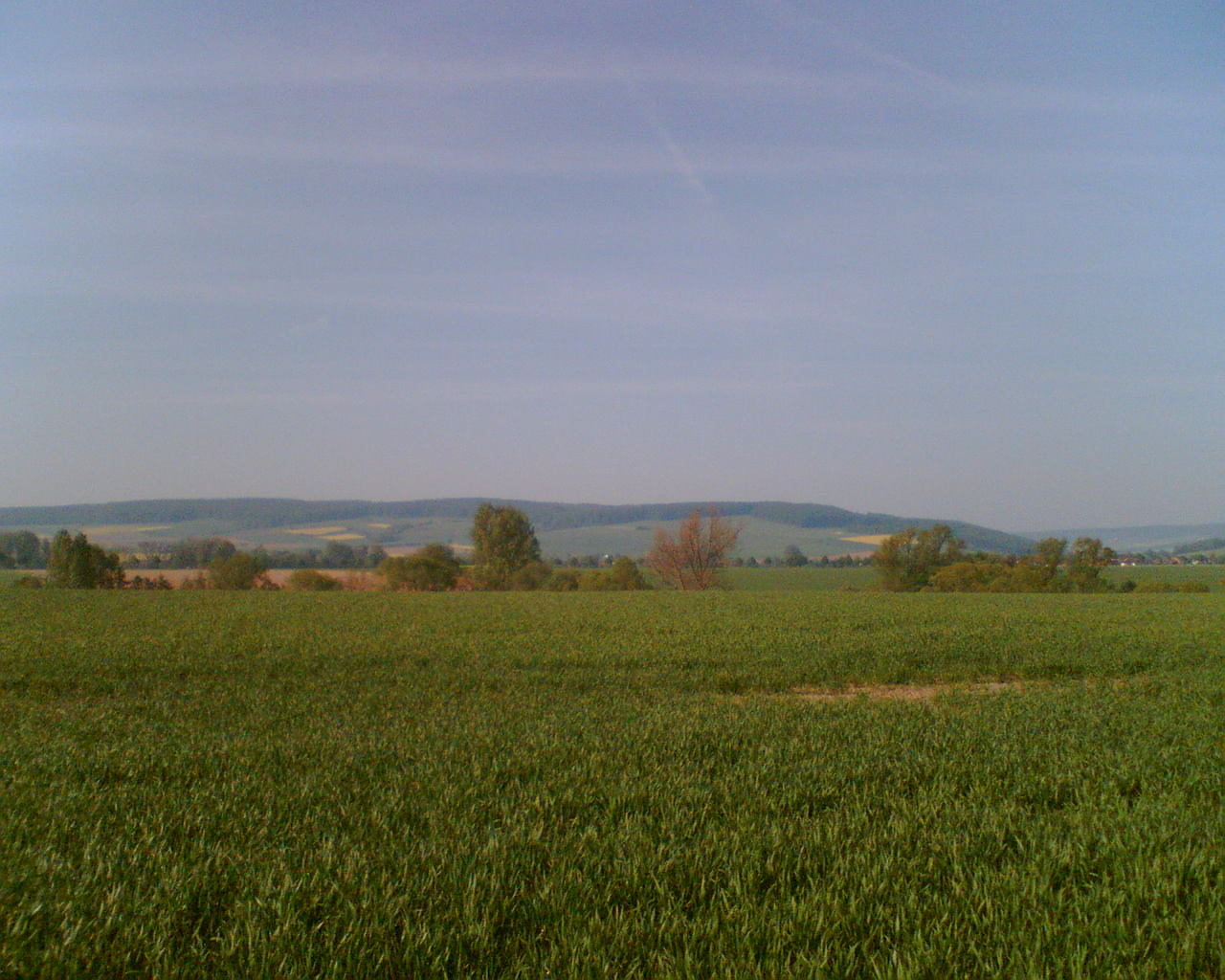 champs dans le Dassel, Allemagne